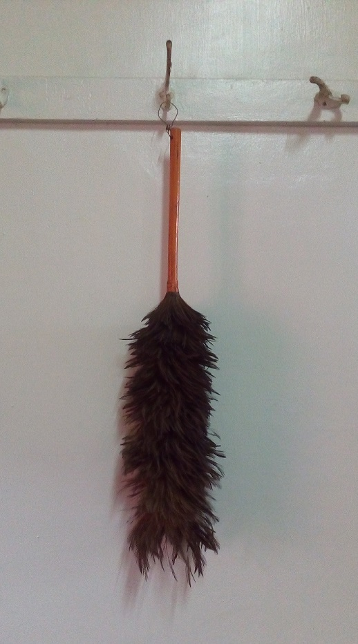 雞毛撢子是清潔灰塵的工具